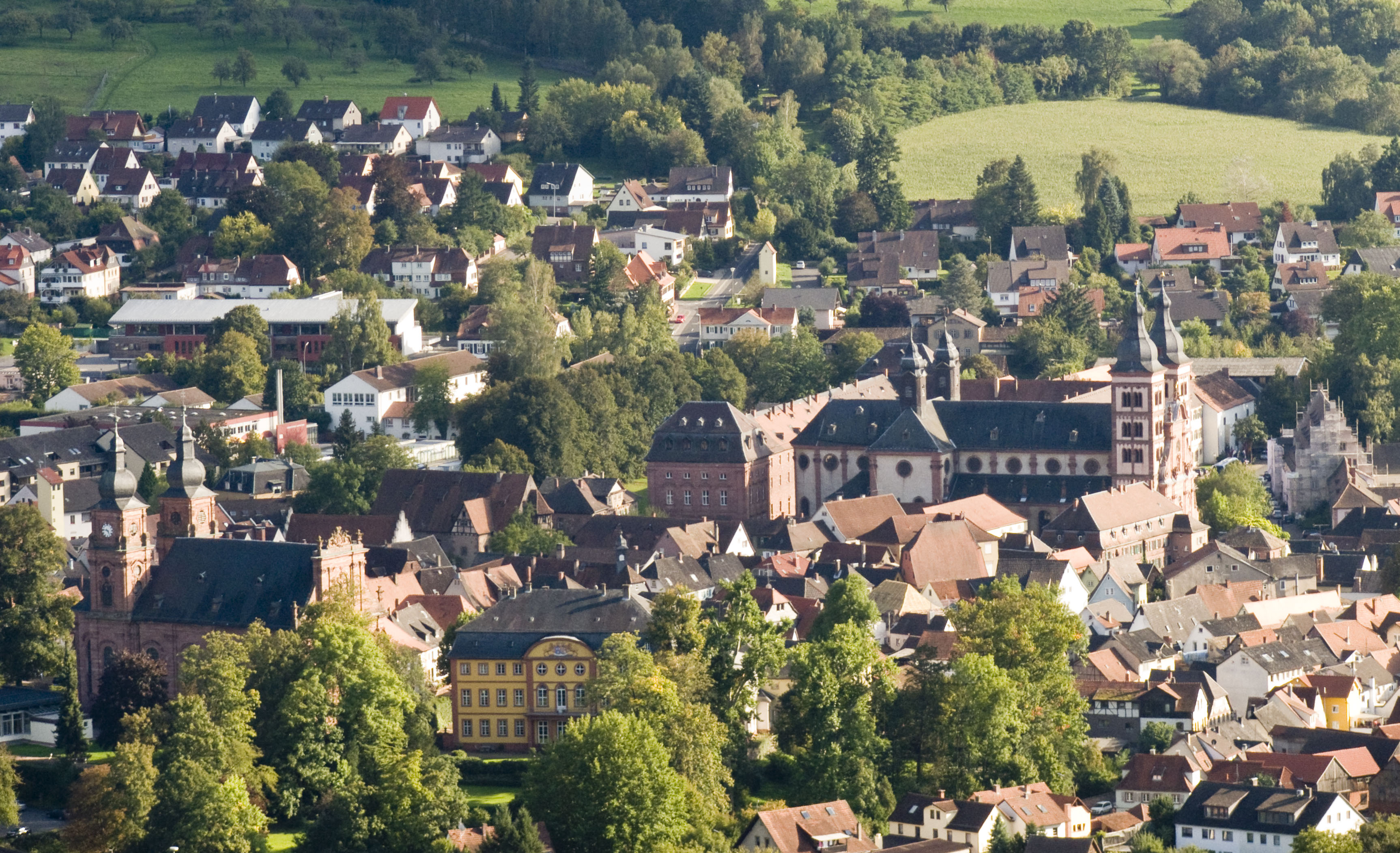 Blick auf Amorbach, links unten die Pfarrkirche St. Gangolf, Mitte : Abteikirche